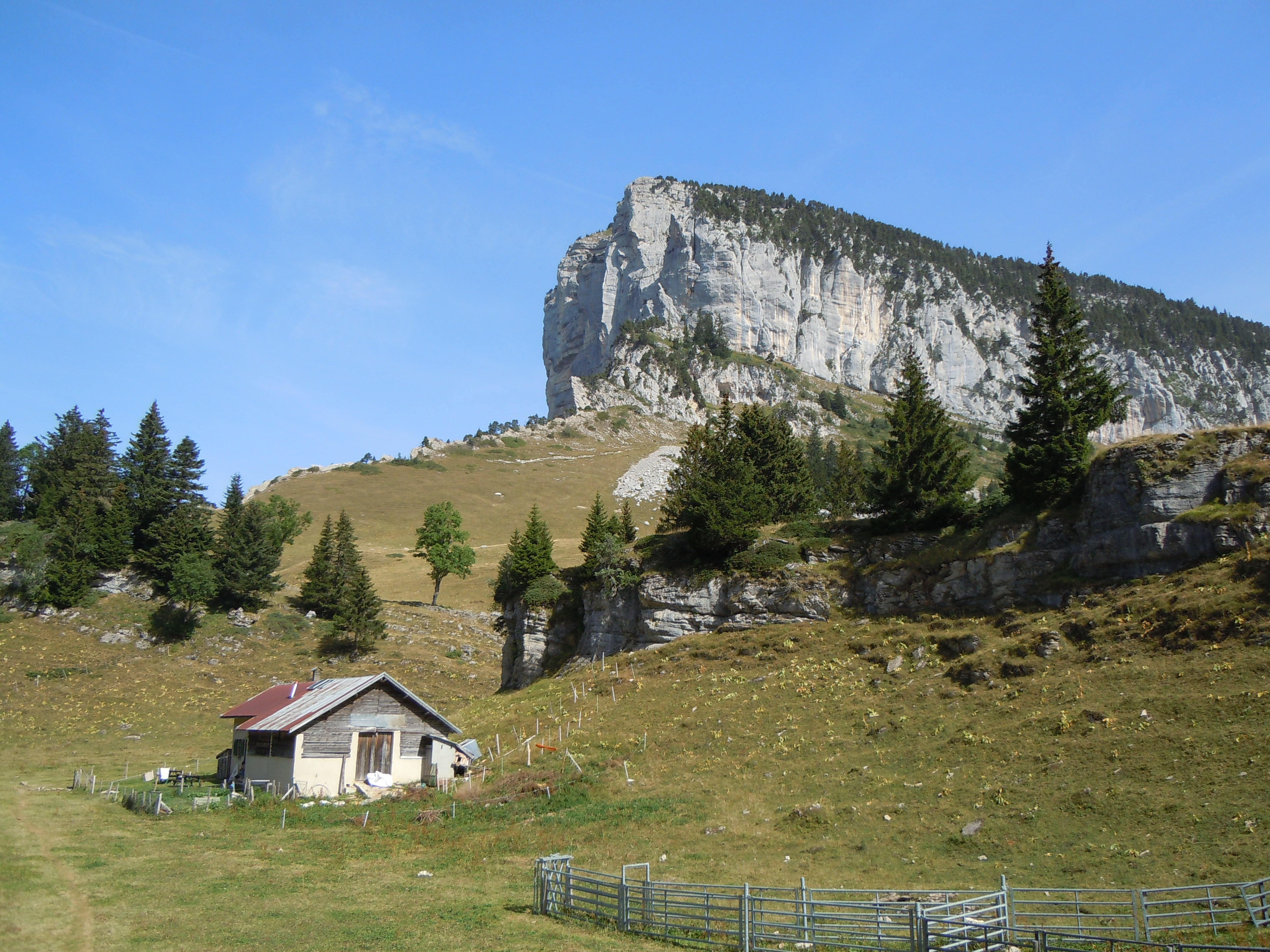 Col de l'Alpette au pied du Mont Granier